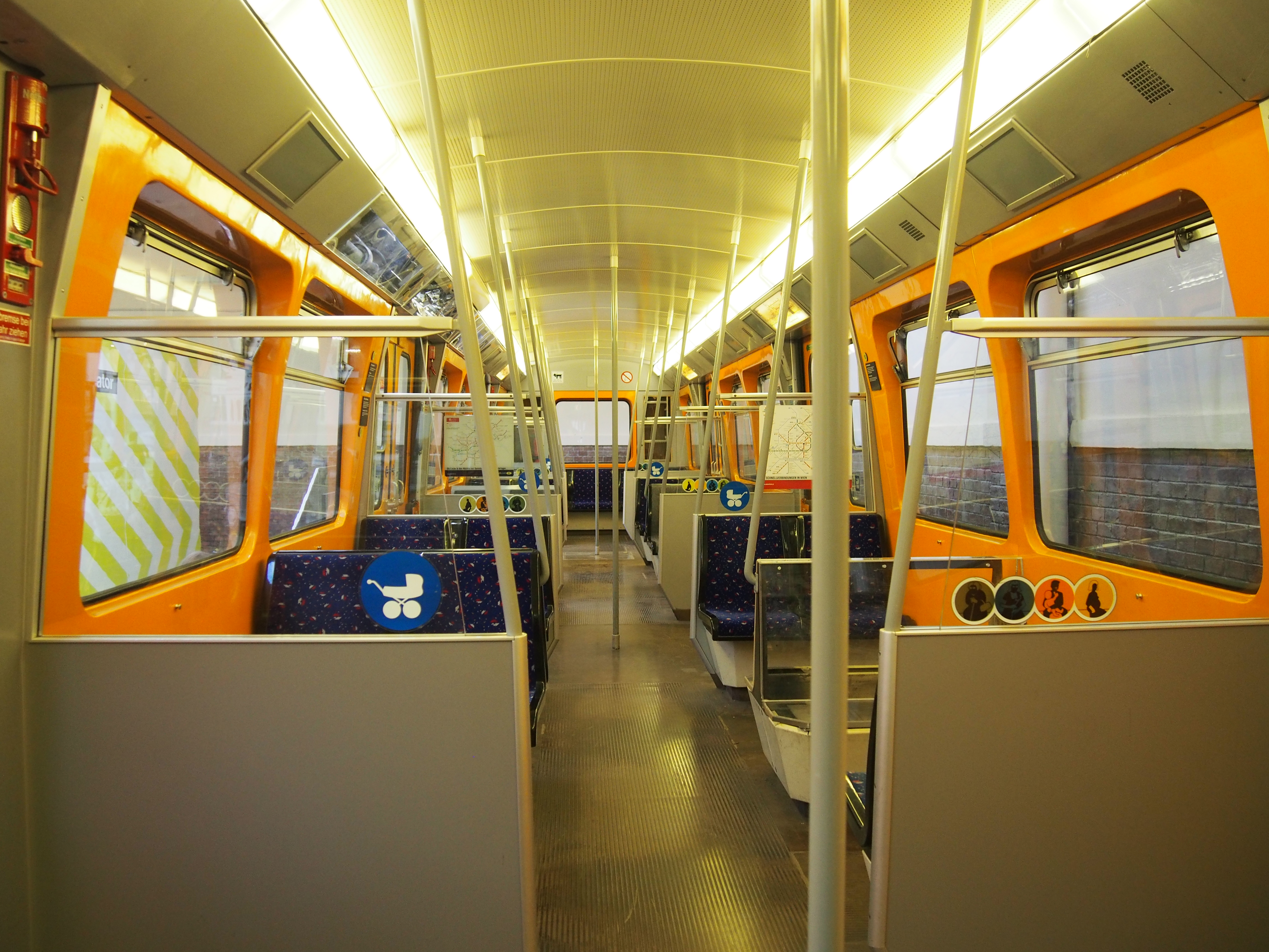 Remise - Transport Museum Vienna (Verkehrsmuseum der Wiener Linien)